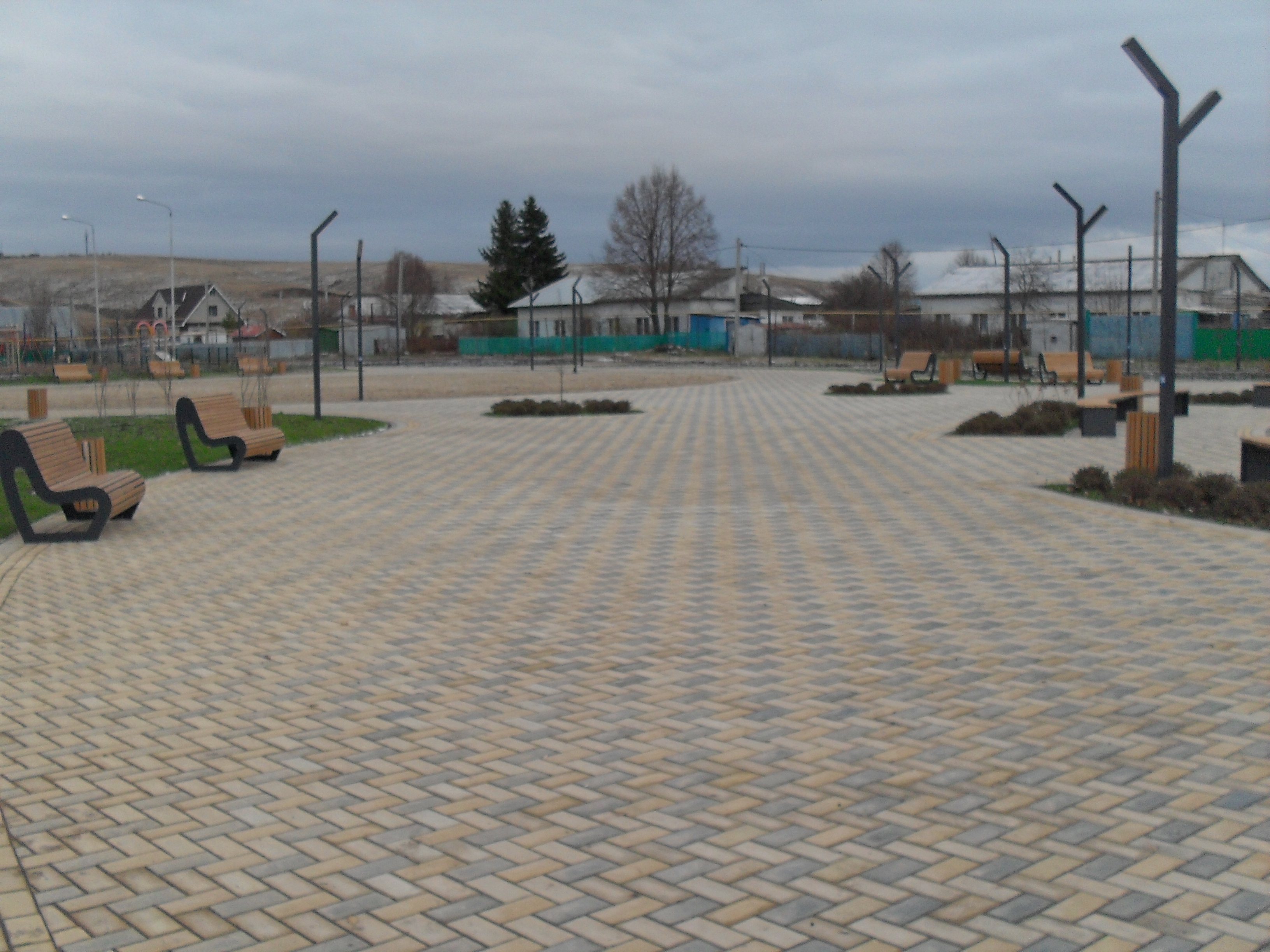 Татарча/tatarça: "Солнечный" паркы Новотроицк авылы